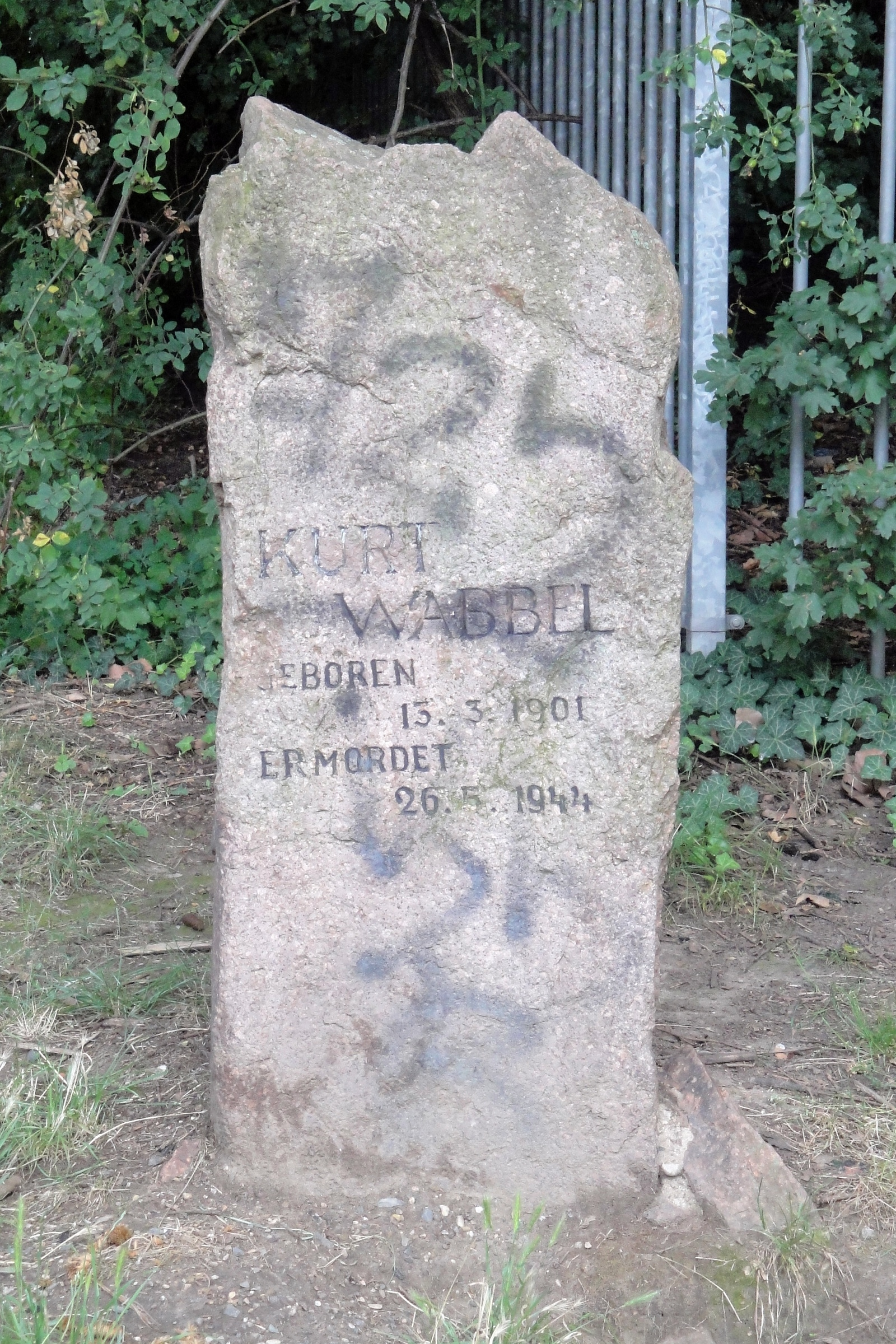 Gedenkstein für Kurt Wabbel, Johannesplatz, Halle (Saale)